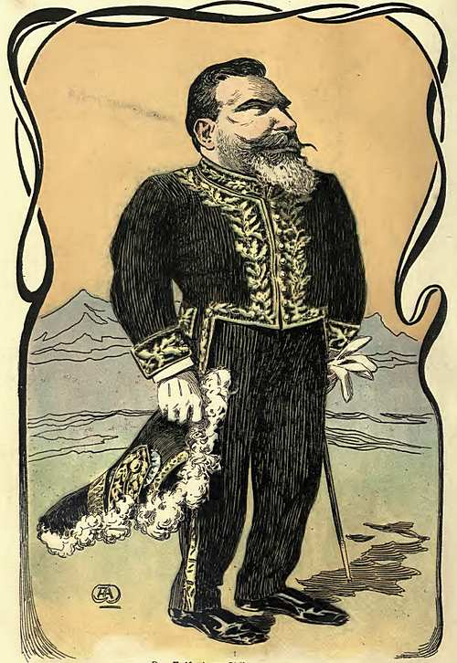 Caricatura por Cao en Caras y Caretas